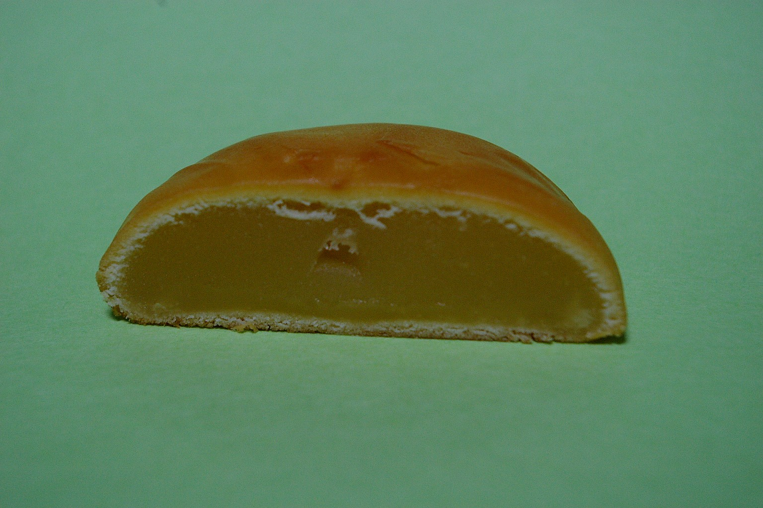 福岡市内で撮影